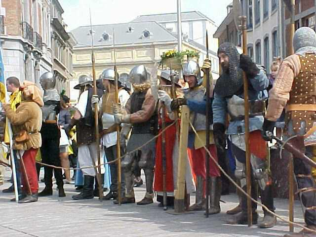 La Malemort